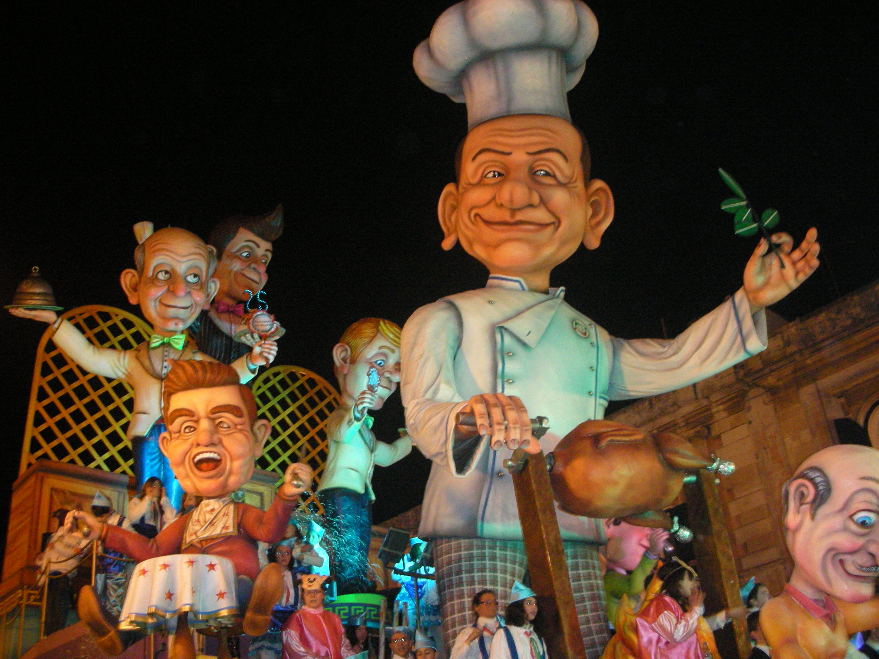 Carro allegorico (edizione 2009) Putignano (BA)